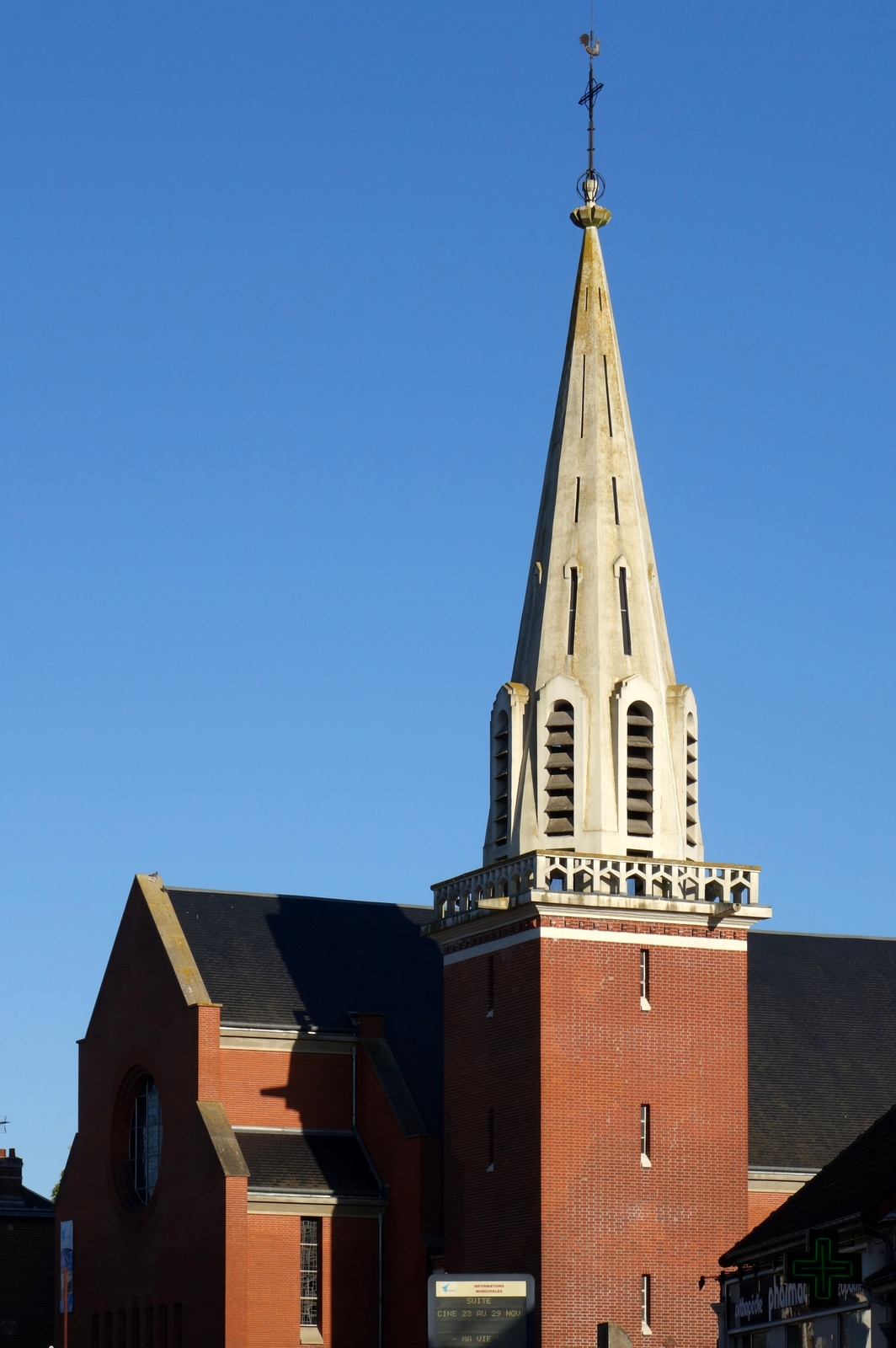 Eglise de Quessy